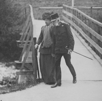 Kaiser Franz Joseph beim Spaziergang mit Katharina Schratt Ischl 1895